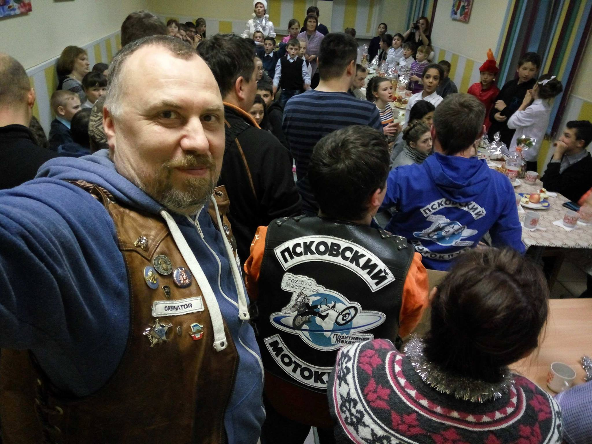 Визит Псковского мотоклуба "Позитивная механика" в Опочецкую коррекционную школы-интернат. 24 декабря 2016 года.